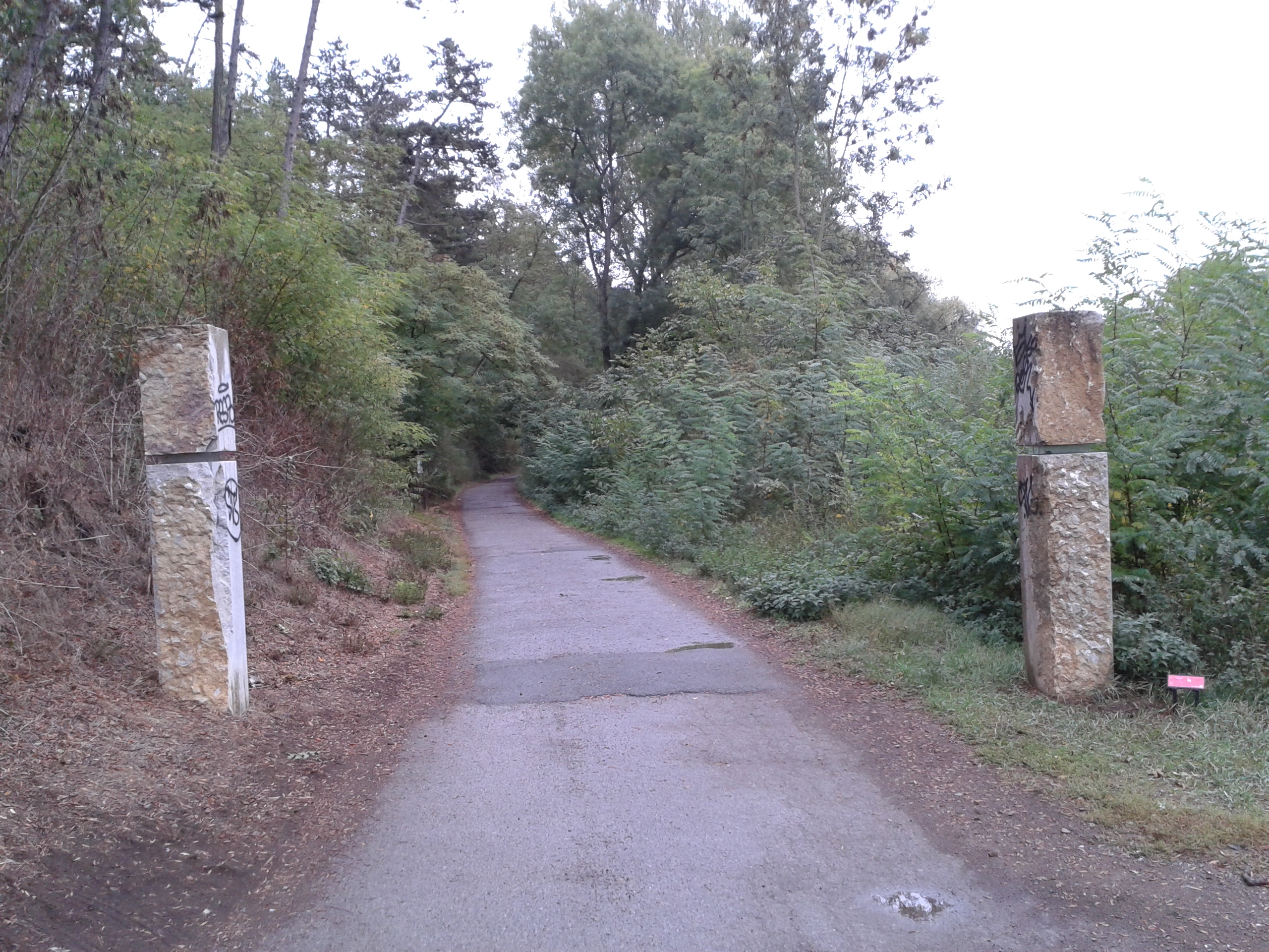 Název díla: Brána; Autor: Zdenek Hůla (* 25. února 1948 Praha) český malíř a sochař, keramik, kurátor a pedagog; Umístění: Na konci Mládkovy ulice, Praha Řeporyje na vstupu do Dalejského údolí. Celkový pohled.